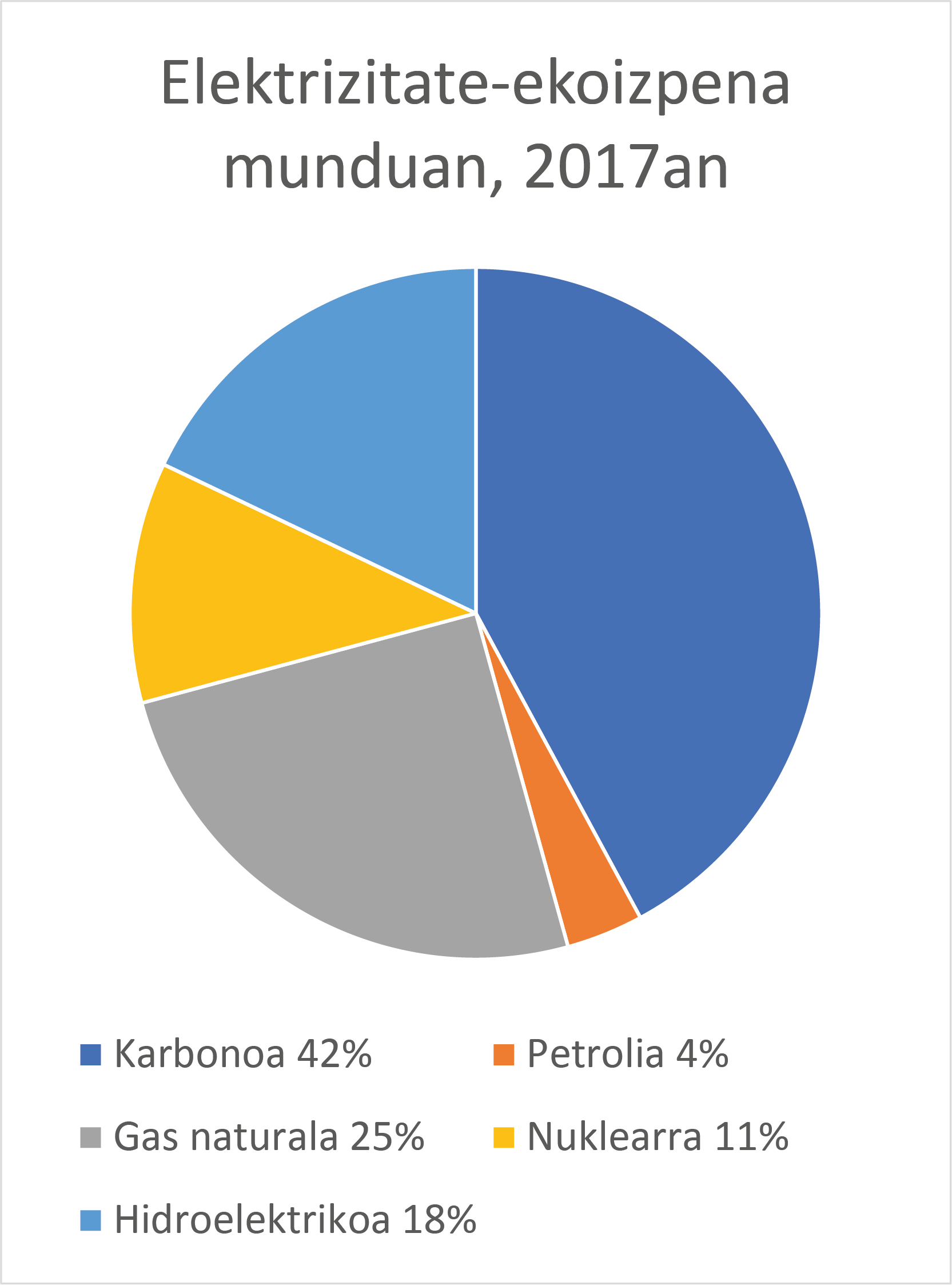 Elektrizitate-ekoizpena munduan, 2017an